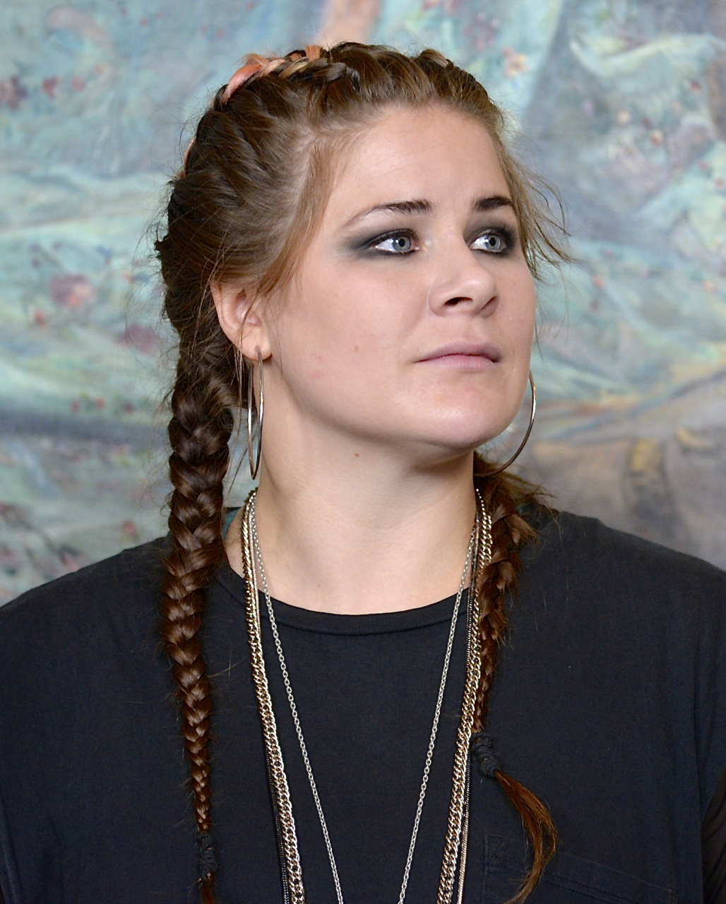 Emma Broomé under Dramatens höstsamling den 19 augusti 2014.